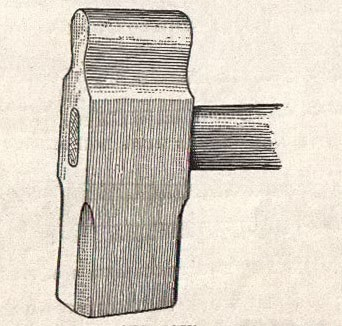 Straight pane sledge hammer